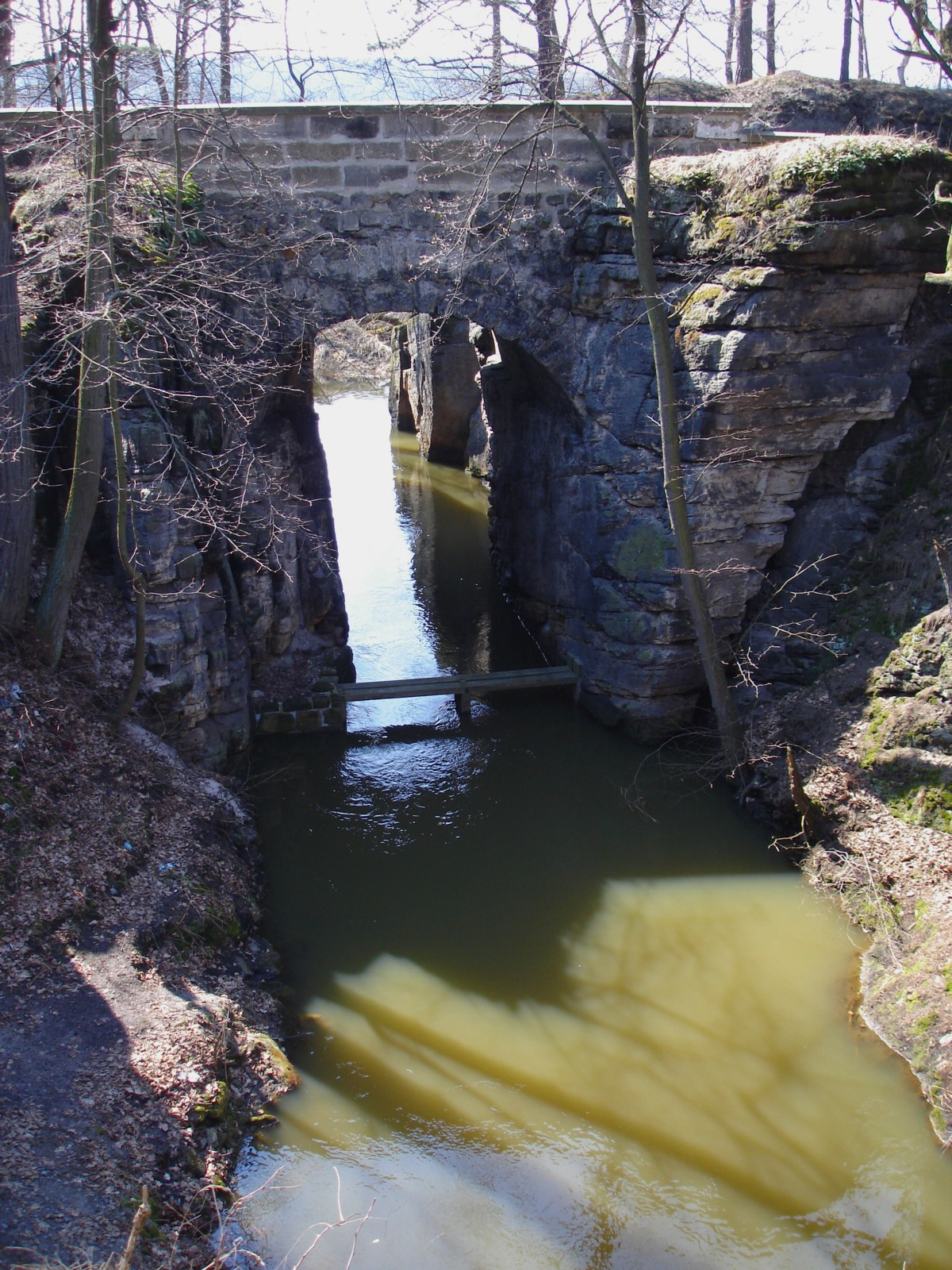 Der Kanal „Münchner Schlucken“ (Mnichovská průrva) bei Zahrádky, Nordböhmen, Tschechien